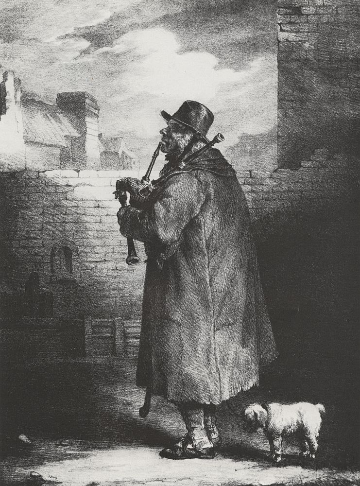 Der Dudelsackspieler, Lithographie